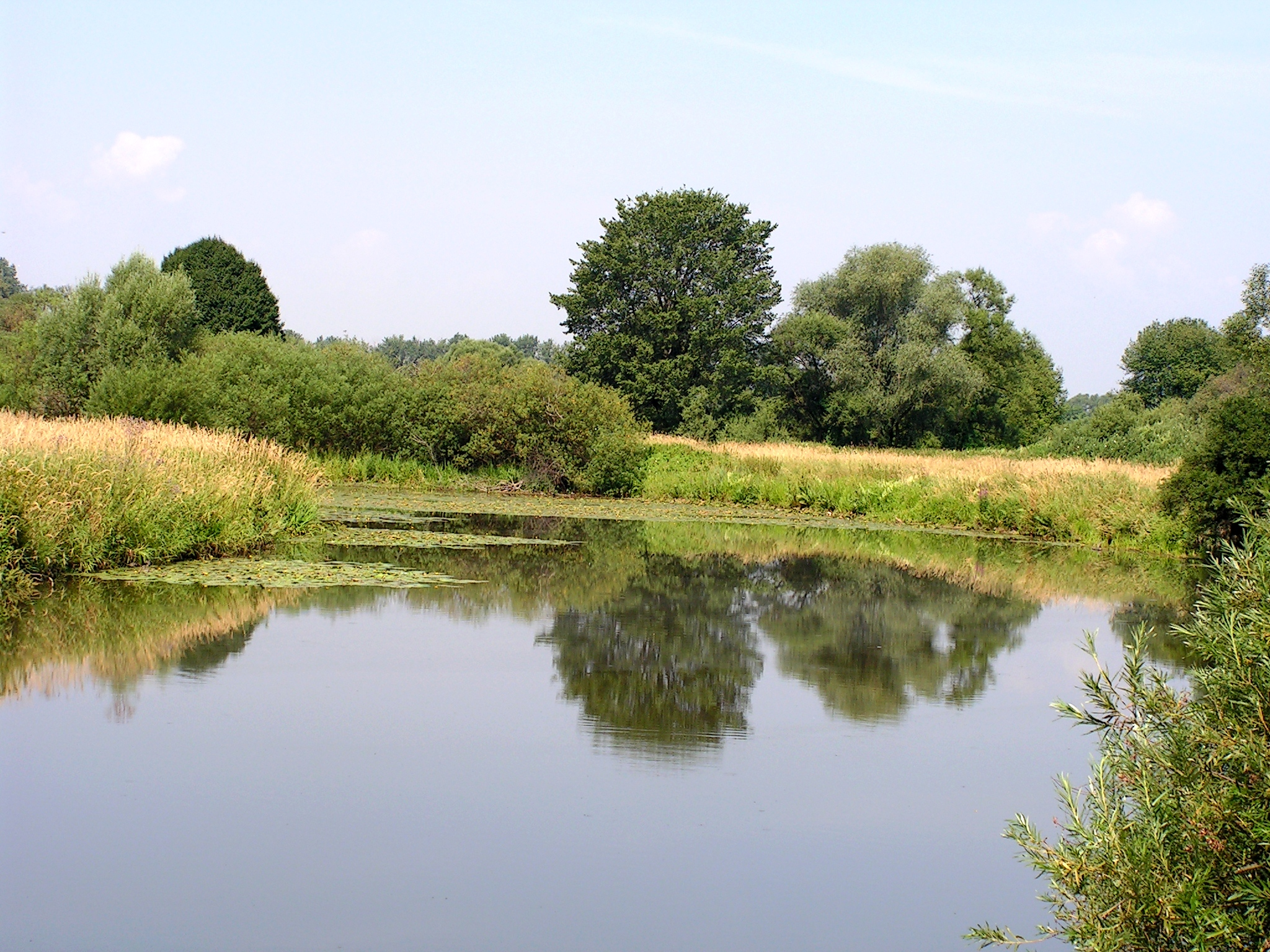 Oxbow lake of Vistula river near Brzeszcze. Starorzecze Wisły w okolicy Brzeszcz.